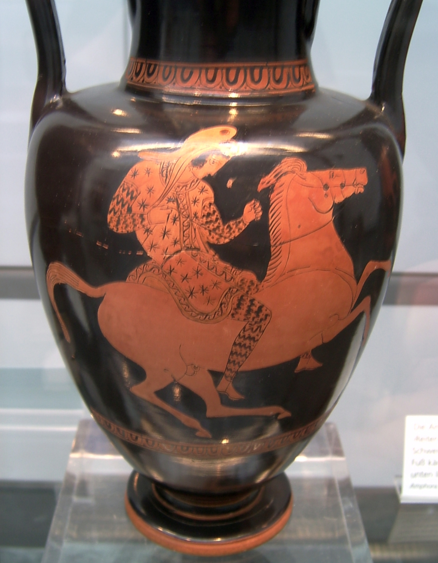 Attisch-rotfigurige Nolanische Amphora mit der Darstellung einer reitenden Amazone in orientalischer Tracht auf der Vorderseite und einer Bogenschießenden Amphora in orientalischer Tracht auf der Rückseite, um 430 v. Chr, gefunden in Agrigent, Staatliche Antikensammlungen, Inventarnummer 2342